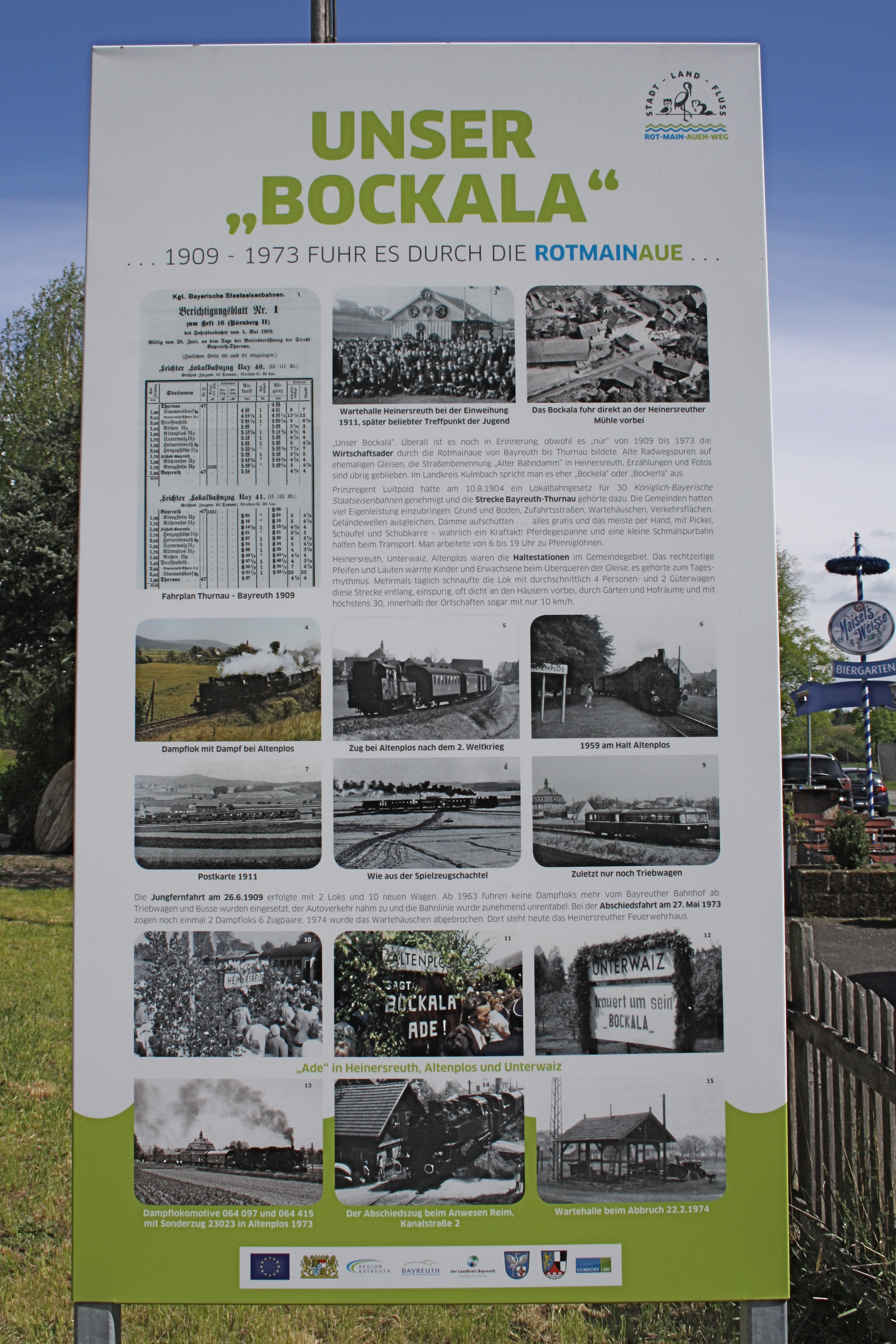 Infotafel zur ehemaligen Bahnstrecke in Altenplos